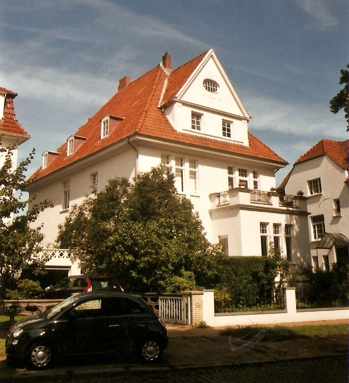 Erster Alterswohnsitz Friedrich von Mejers in der Kaiser-Freidrich-Straße Nr. 23